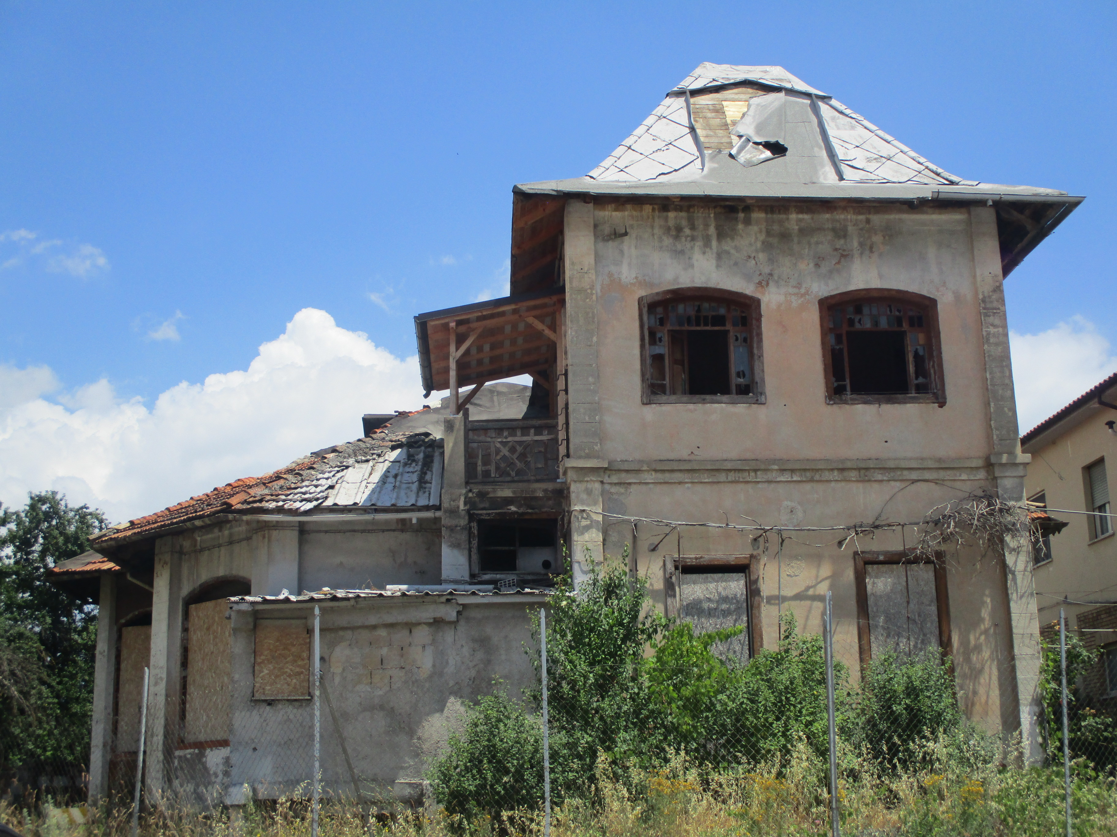 Villino Cimarosa